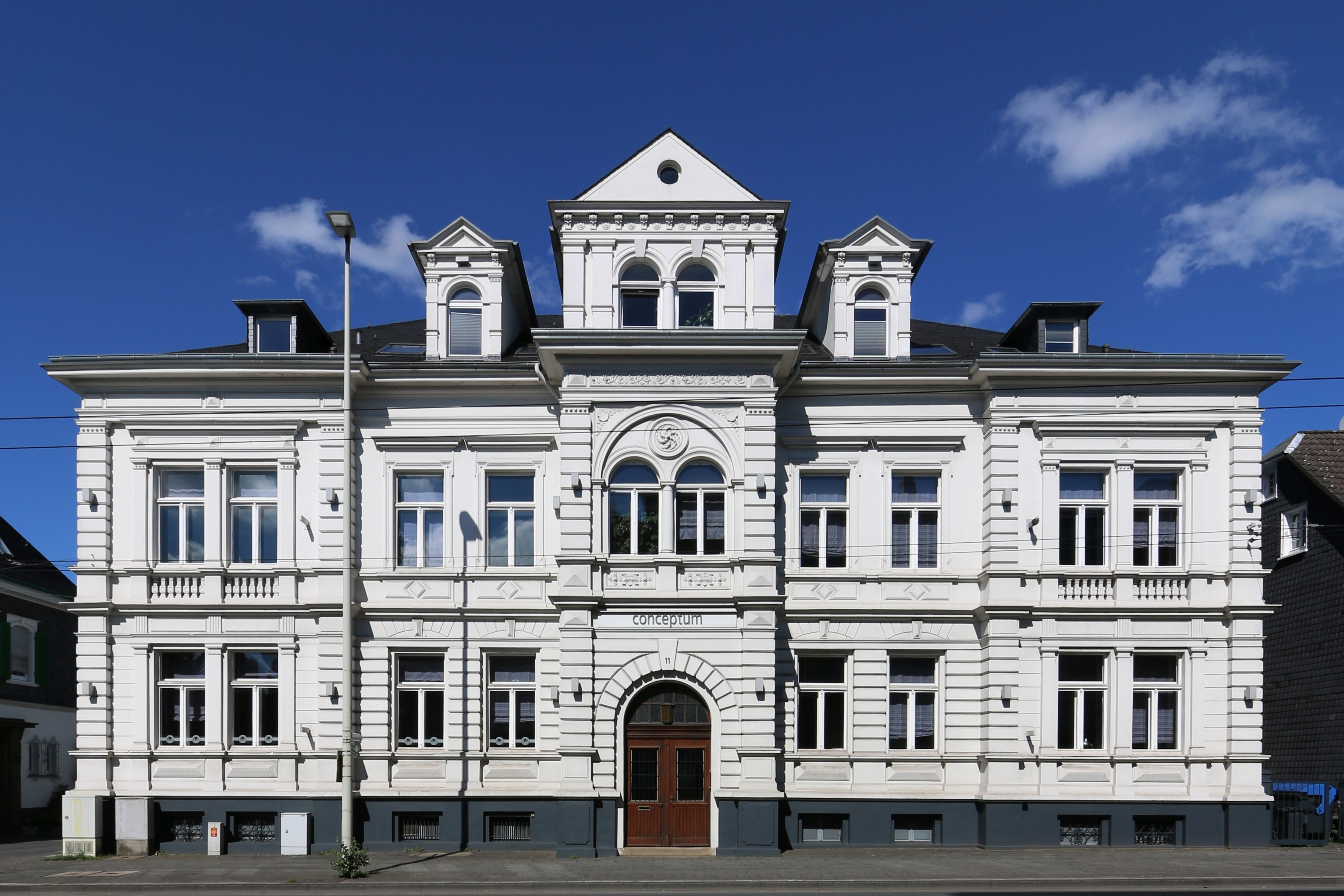 Ehemaliges Rathaus Höhscheid, Neuenhofer Straße 11 This is a photograph of an architectural monument.